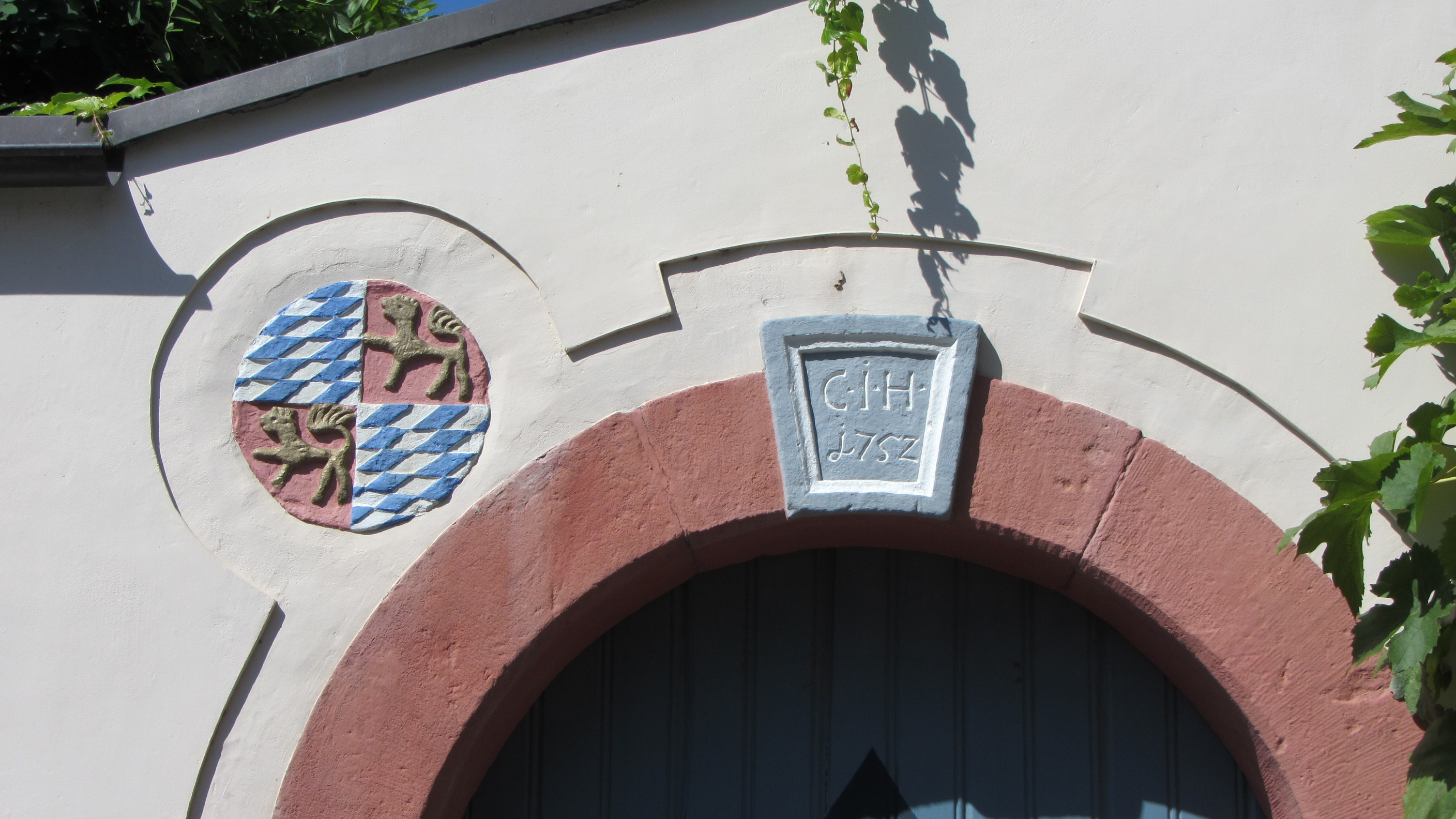 Blason du maire de Leiselheim avec la date de construction